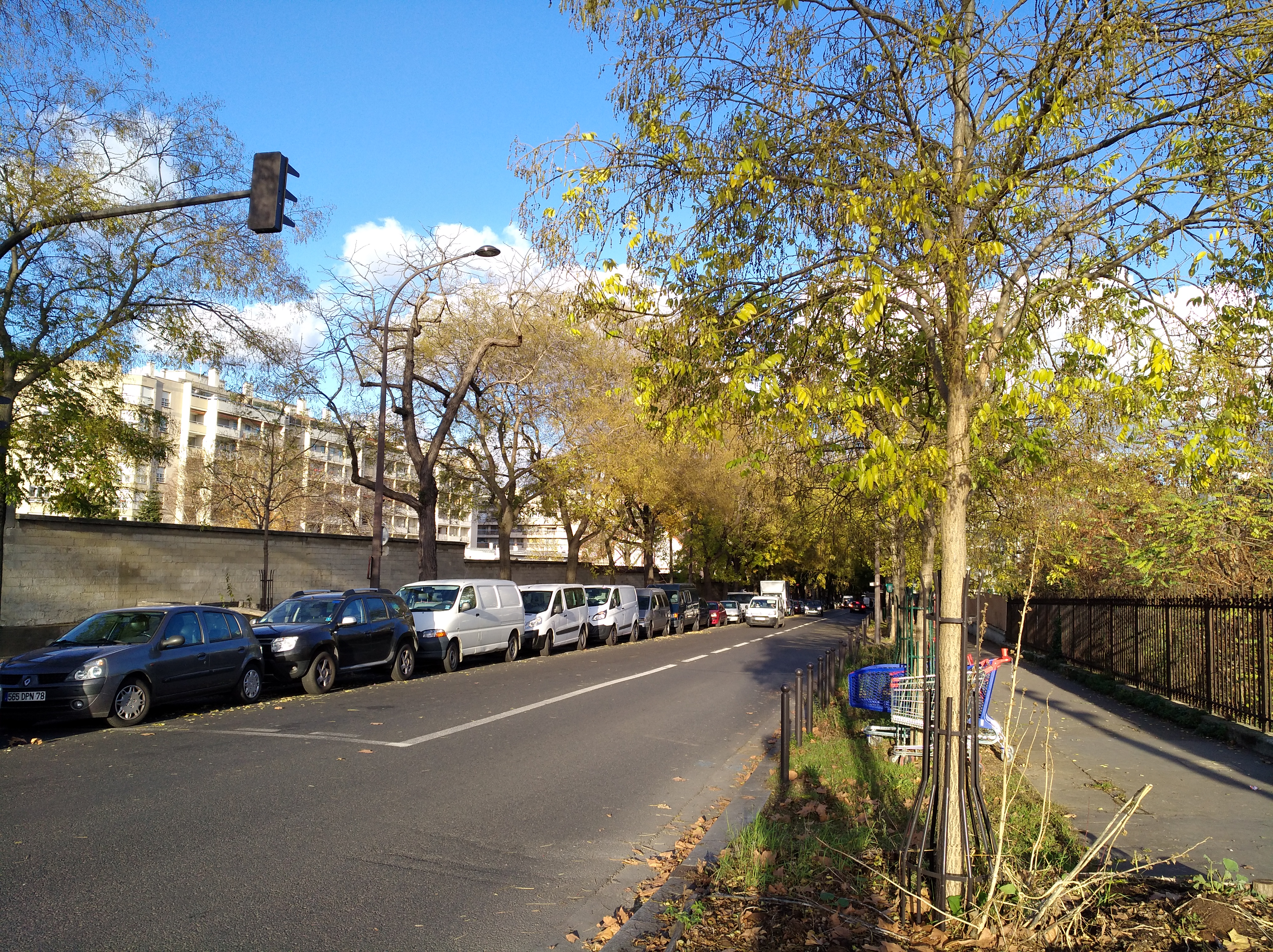 Avenue du Général Michel Bizot, dans le 12e arrondissement de Paris.